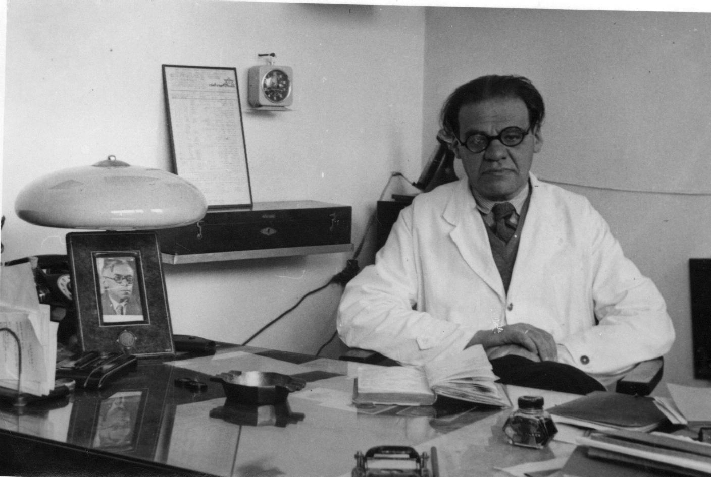 ד"ר יוסף פעמוני יושב ליד שולחן עבודתו במשרדי קופת חולים לאומית. על השולחן מונחת תמונתו של המנהיג הציוני זאב ז'בוטינסקי